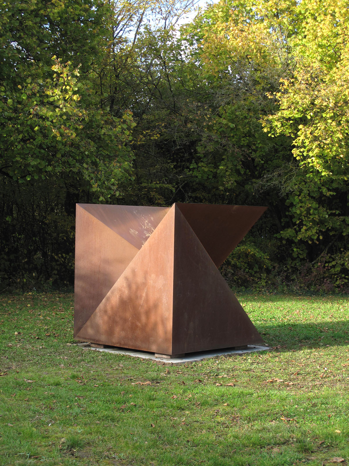 Hans Dieter Bohnet, Kubus XIII 99, 1999, - Deutschland, Baden-Württemberg, Herrenberg, Jerg Ratgeb Skulpturenpfad, Bahnhofstraße